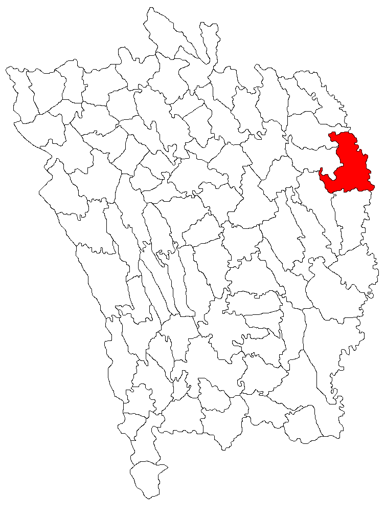 Categorie:Hărţi ale judeţului Vaslui